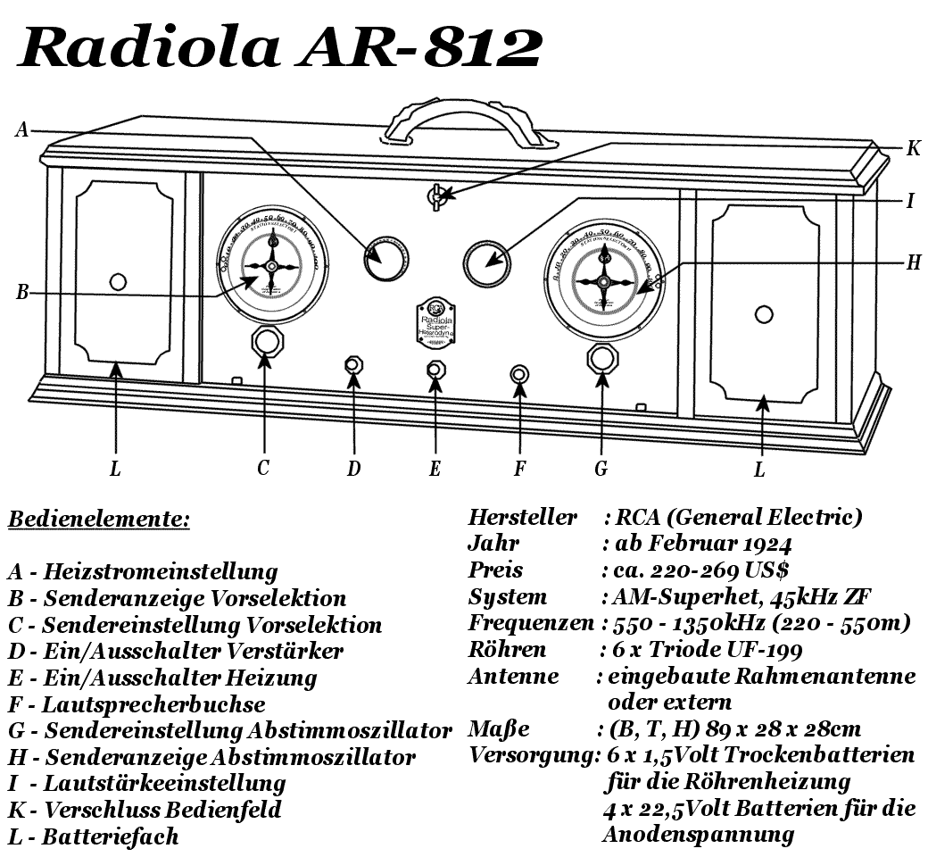 RCA Superhet "Radiola AR-812" Skizze, selbst gezeichnet, Lizenz: GNU-FDL